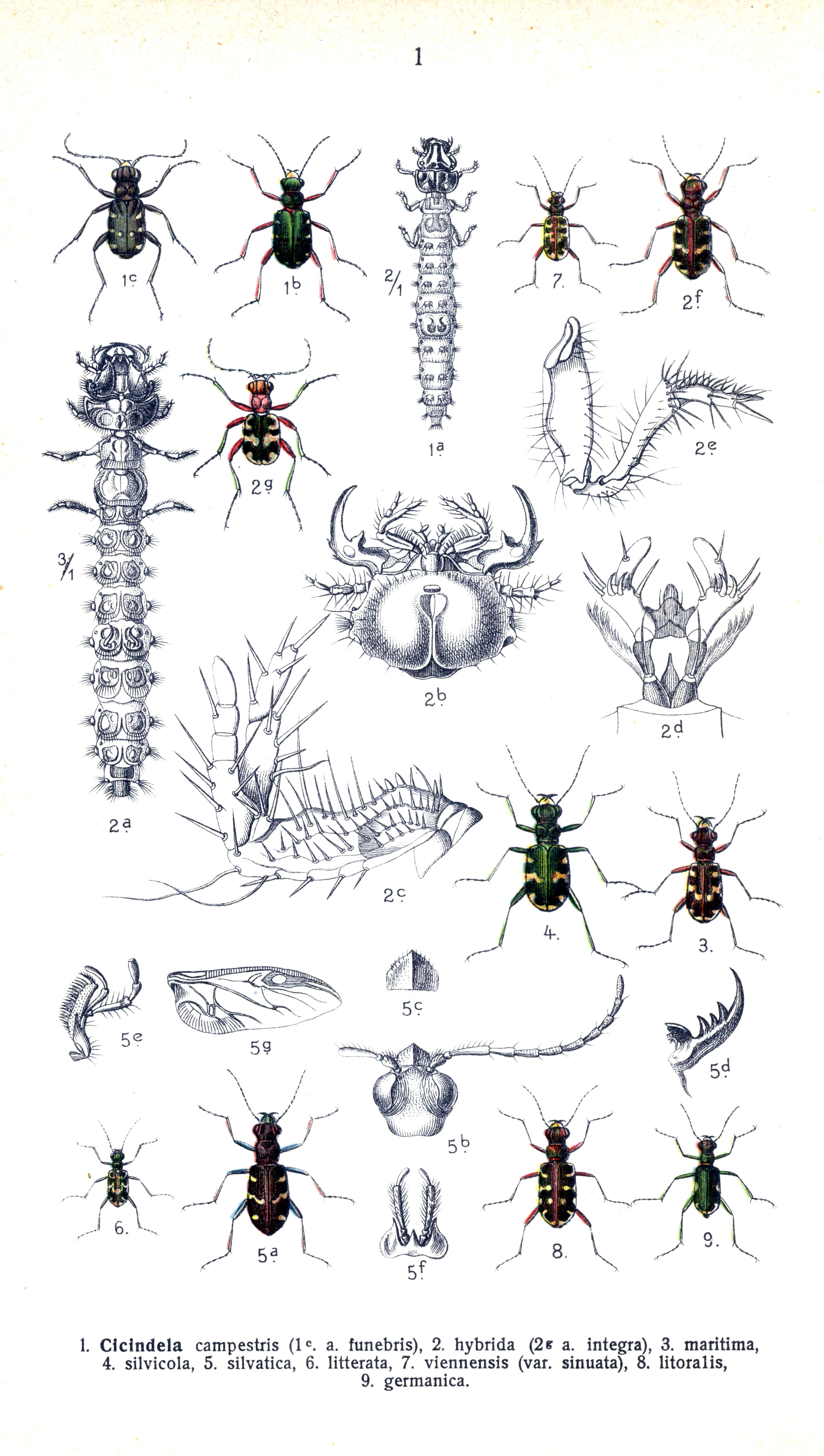 See image for index to numbers. Cicindela campestris L. = Cicindela campestris Linnaeus, 1758 (1a: larva, dorsal view, 1b: Cicindela campestris campestris, adult, dorsal view, 1c: a. funebris Strm. = Cicindela campestris nigrita Dejean 1825, adult, dorsal view) [Cicindela] hybrida L. = Cicindela hybrida Linnaeus, 1758 (2a: larva, dorsal view, 2b: head of larva, ventral view, 2c: maxilla of larva, 2d: labium of larva, 2e: foreleg of larva, 2f: adult, dorsal view, 2g: a. integra = Cicindela hybrida f. integra, adult, dorsal view) [Cicindela] maritima Latr. = Cicindela maritima Dejean in Latreille & Dejean, 1822, adult, dorsal view [Cicindela] silvicola Latr. = Cicindela sylvicola Dejean in Latreille & Dejean, 1822, adult, dorsal view [Cicindela] silvatica L. = Cicindela sylvatica Linnaeus, 1758 (5a: adult, dorsal view, 5b: head, dorsal view, 5c: labrum, 5d: mandible, 5e: maxilla, 5f: labium, 5g: hindwing) [Cicindela] litterata Sulzer. = Cylindera arenaria arenaria (Füssli, 1775), adult, dorsal view [Cicindela] viennensis Schrank (var. sinuata Panz.) = Cylindera arenaria viennensis (Schrank, 1781), adult, dorsal view [Cicindela] litoralis F. = Calomera littoralis (Fabricius, 1787), adult, dorsal view [Cicindela] germanica L. = Cylindera germanica (Linnaeus, 1758), adult, dorsal view